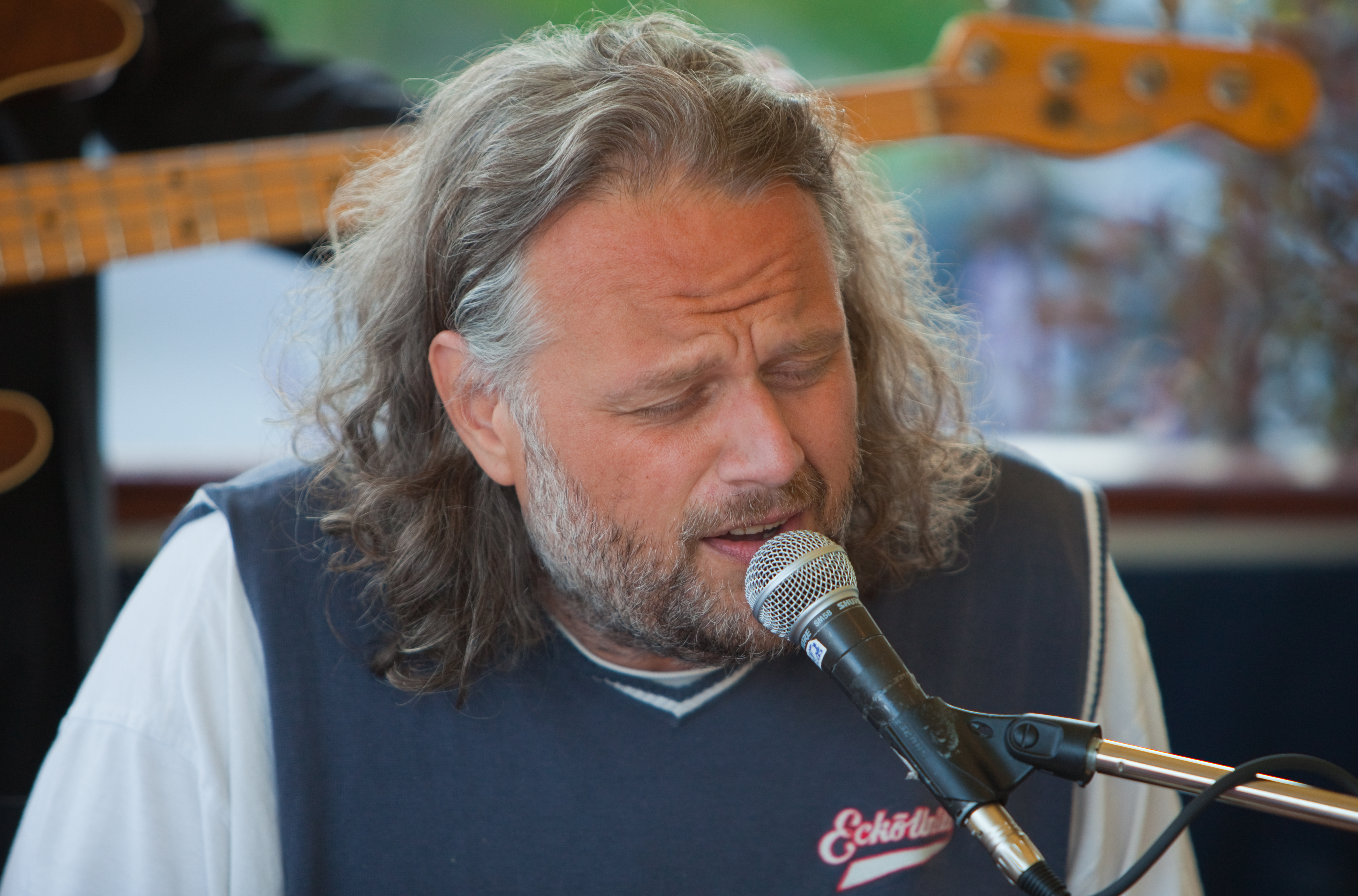 Peter Hallström on keyboards in Soulbrothers at Winbergs, Vaxholm, June 2011